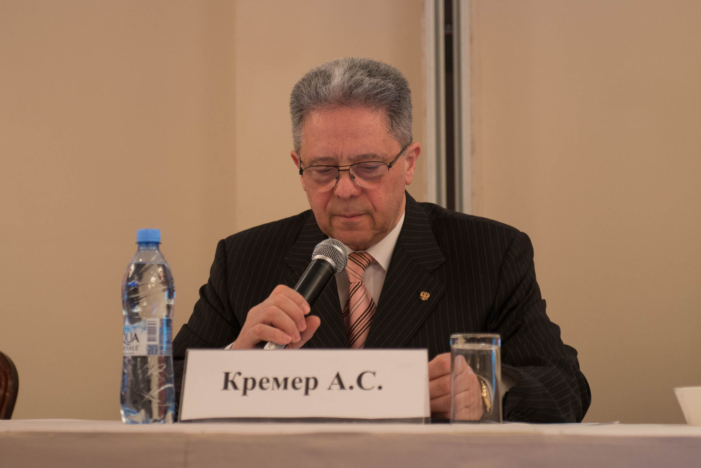 Председатель Исполкома АДЭ А.С. Кремер на конференции «Обеспечение доверия и безопасности при использовании ИКТ» 28 марта 2017 года